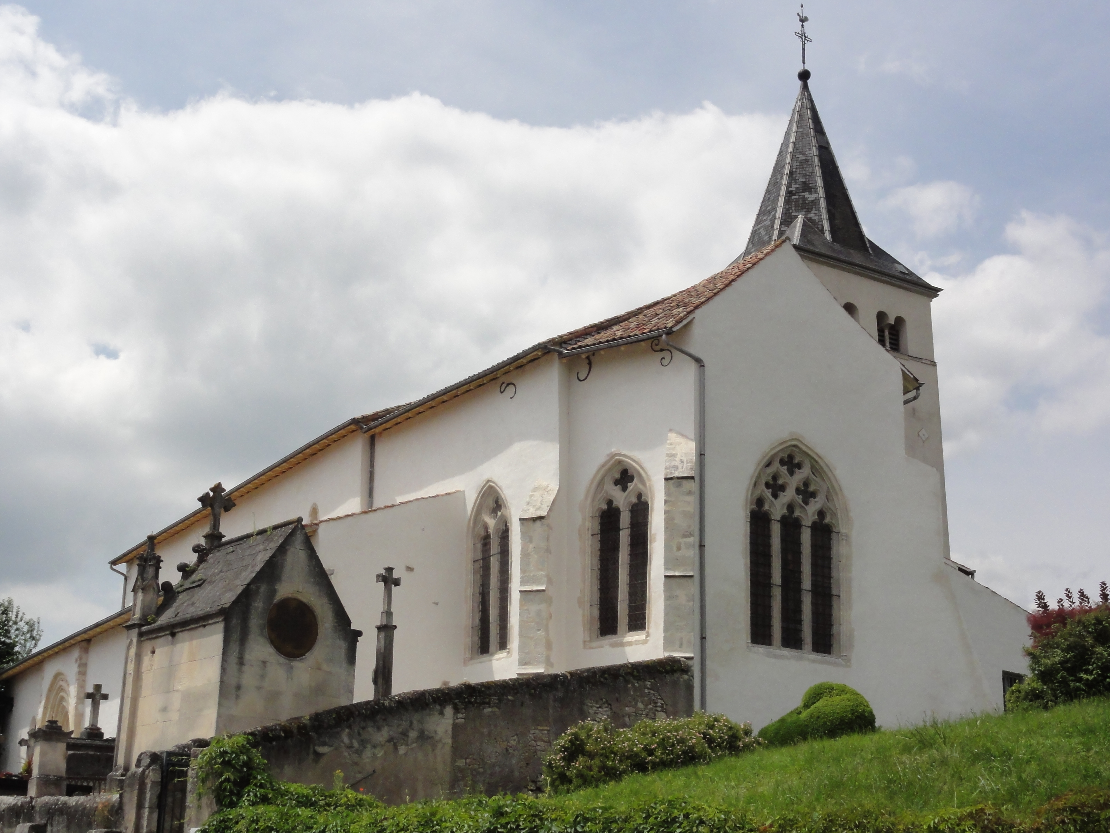 Froville (M-et-M) Prieuré, église, extérieur .